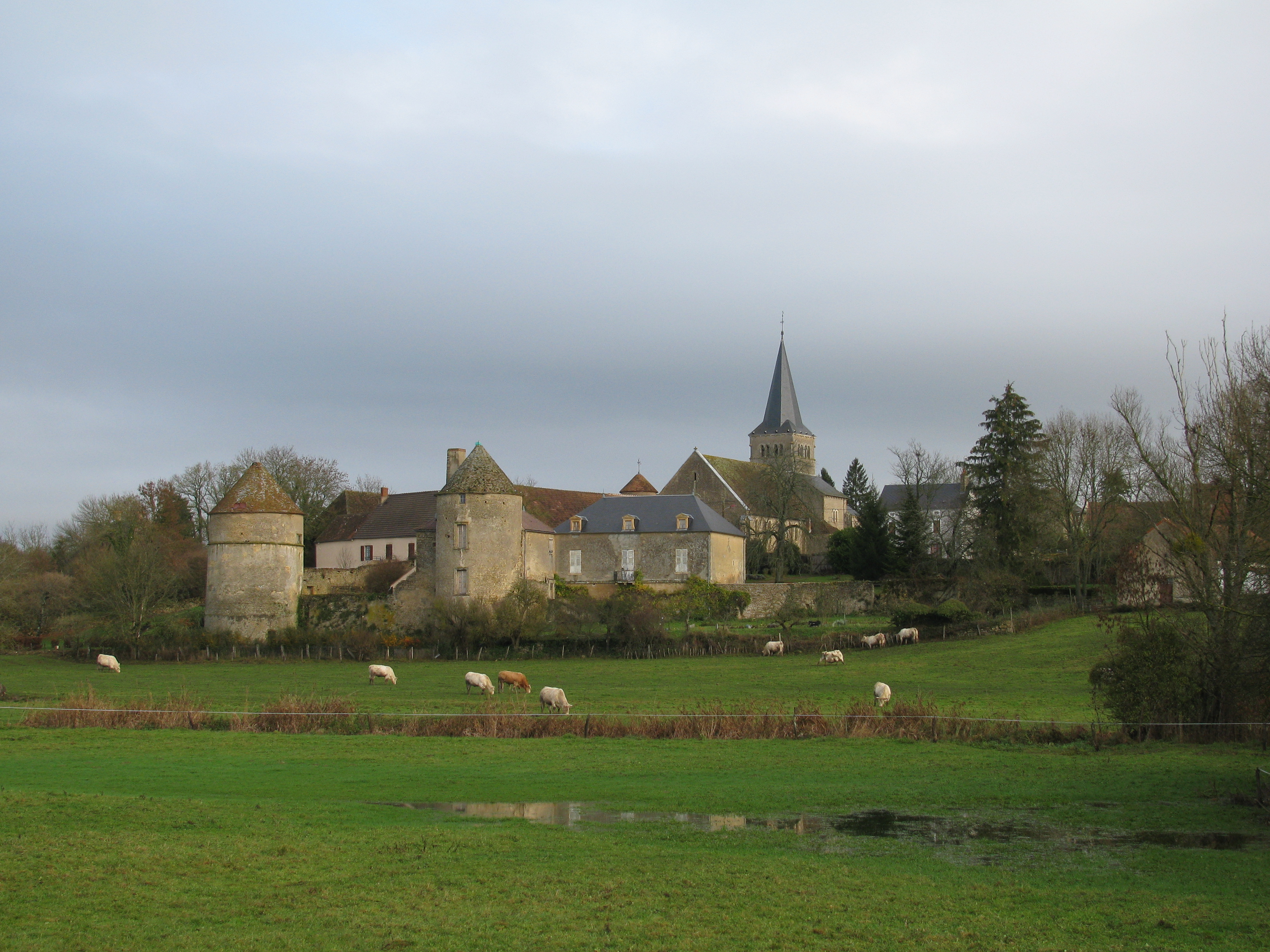 Vue de Montigny-sur-Canne, département de la Nièvre.